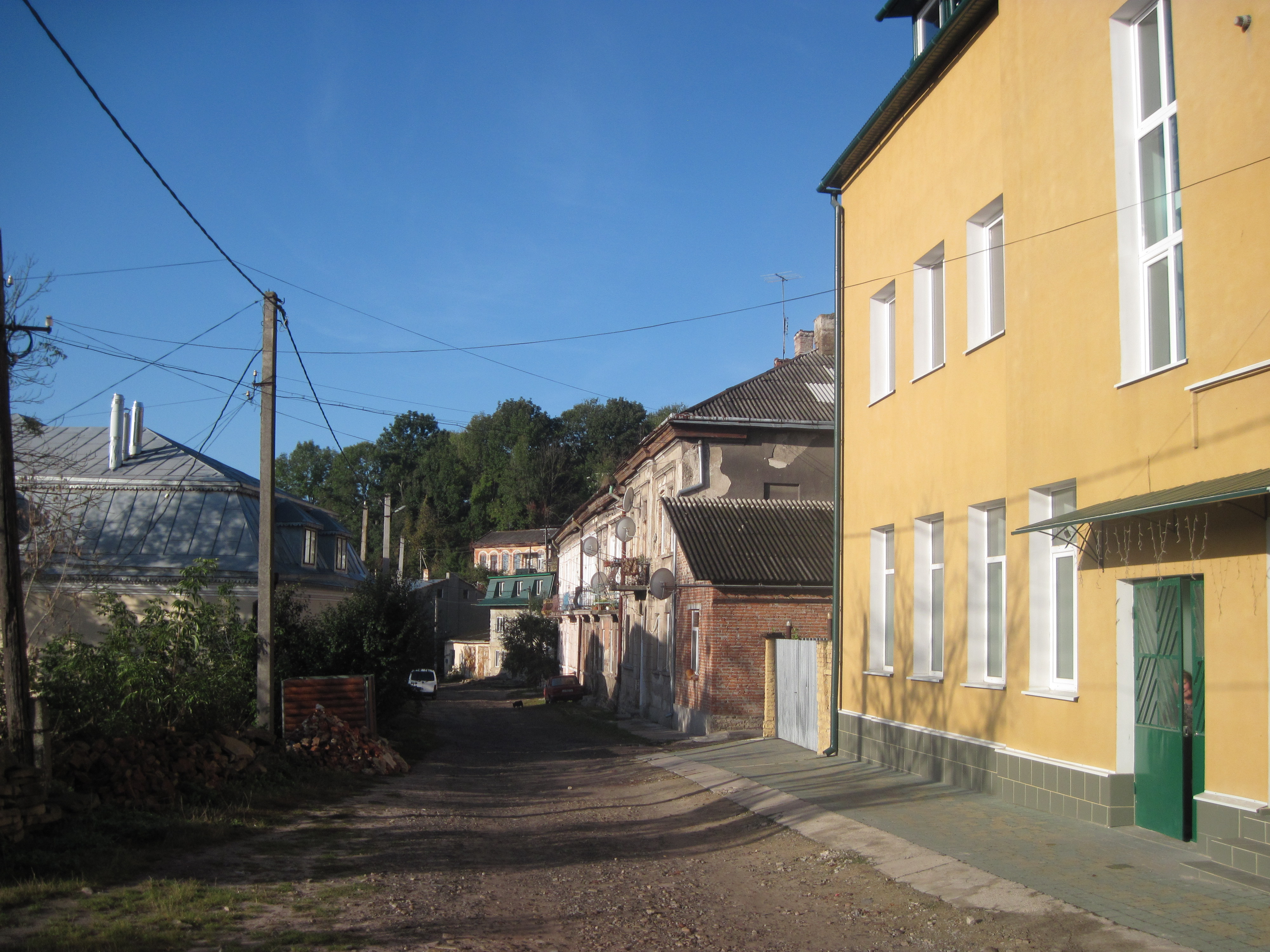 Вулиця св. Миколая, Бучач, осінь 2014